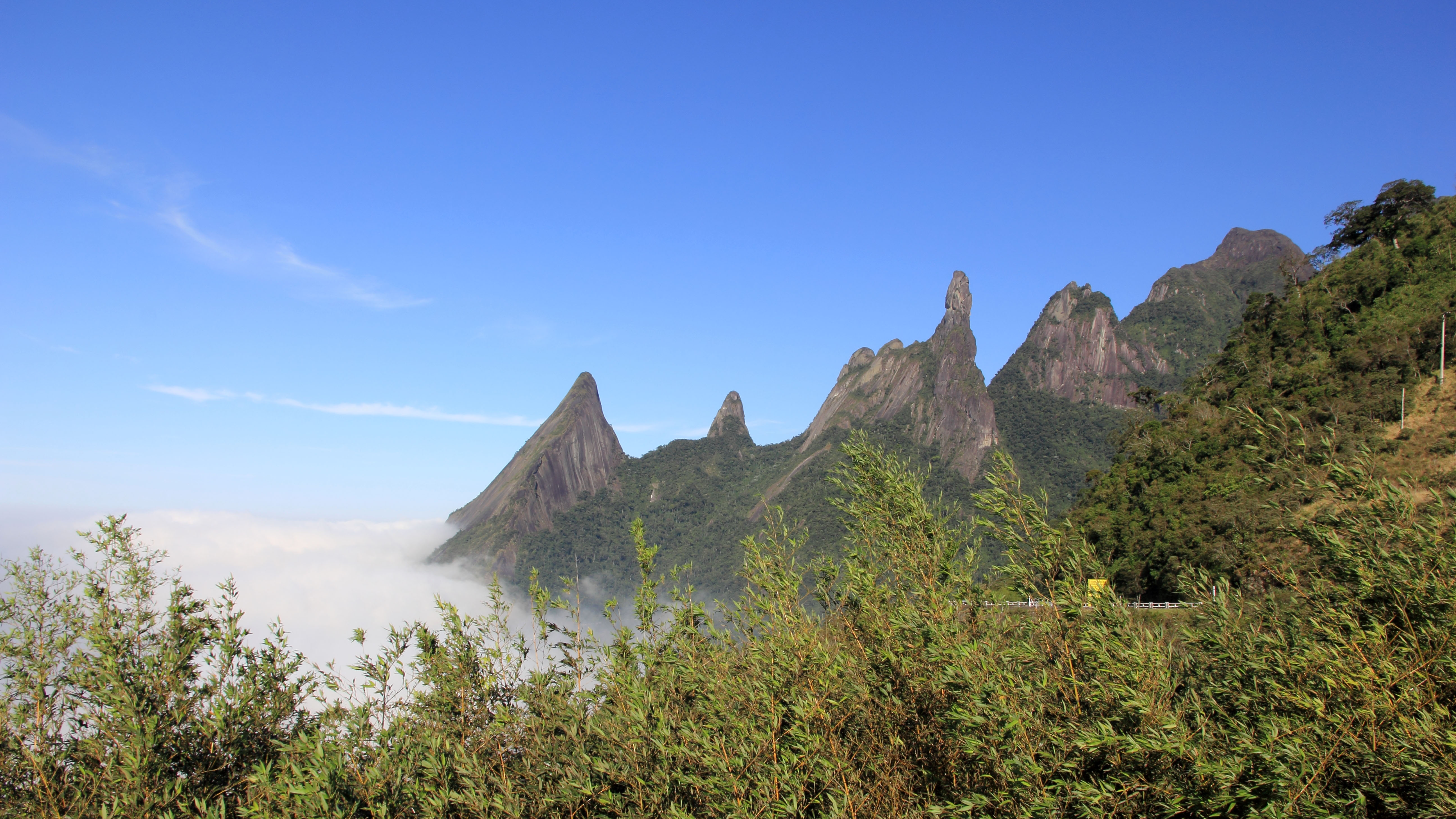 Escalavrado, Dedo de Nossa Senhora, Dedo de Deus e Pedra do Sino.